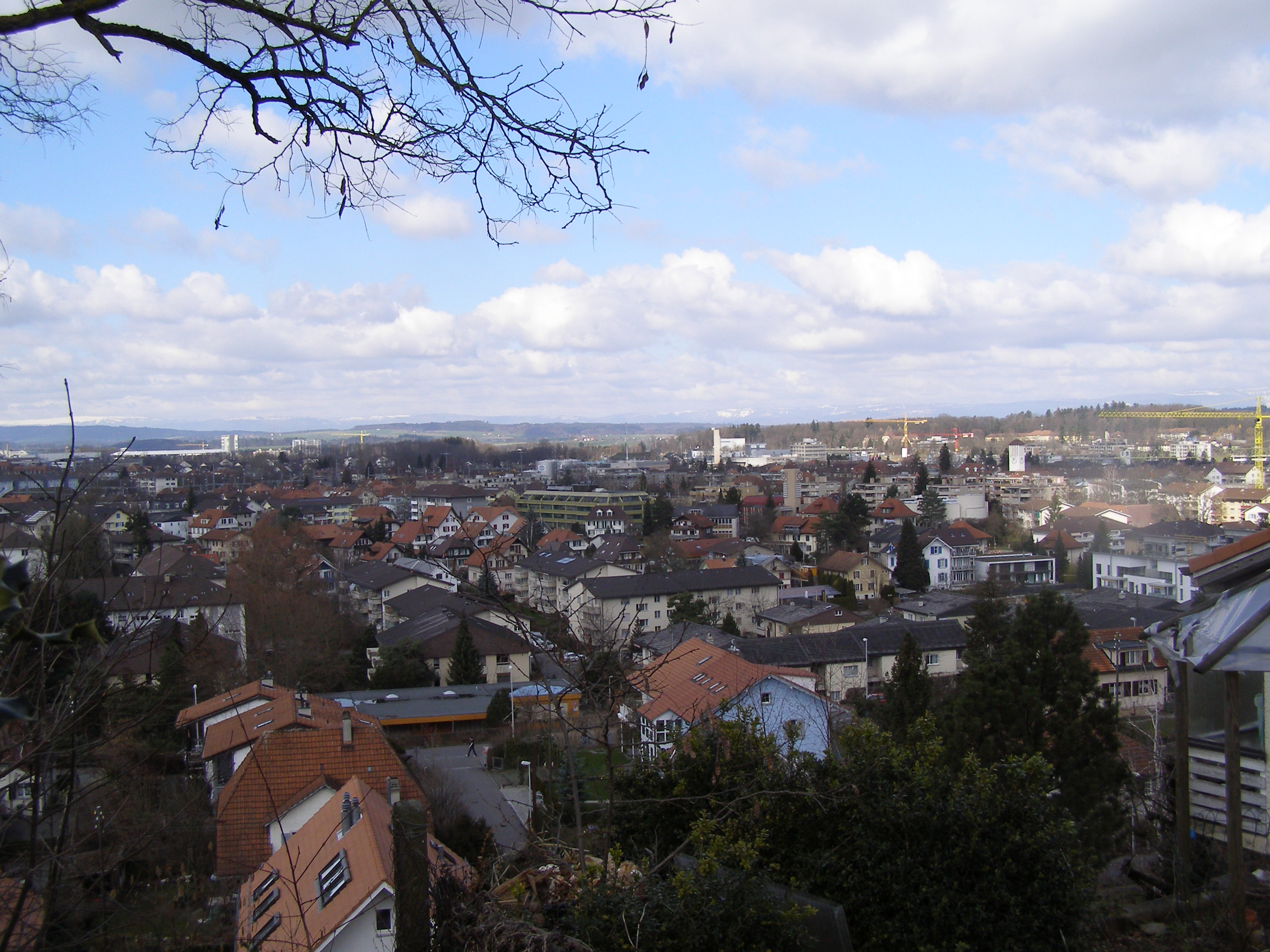 Sicht vom Ostermundigenberg auf Ostermundigen, Richtung Zentrum